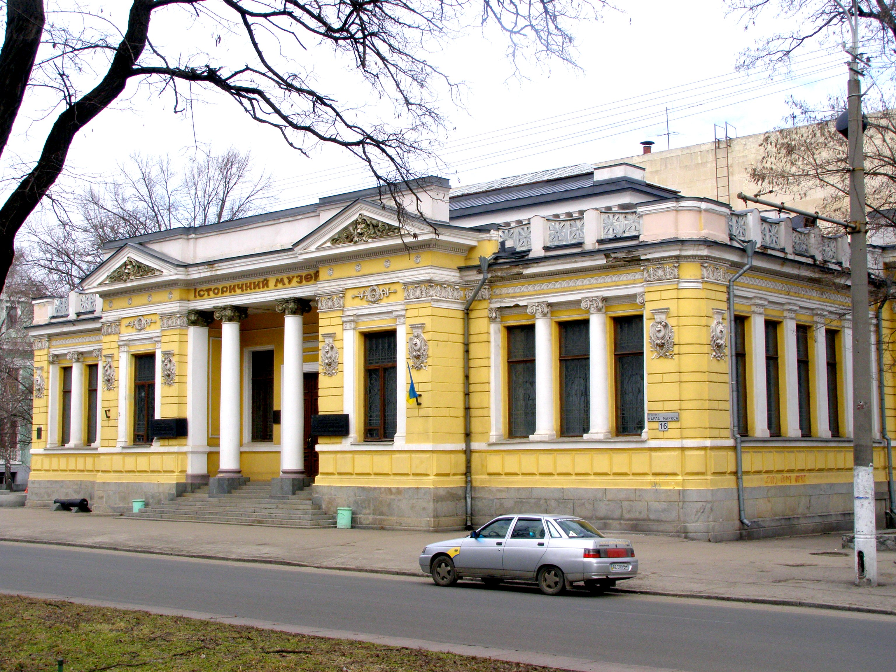 ДИМ